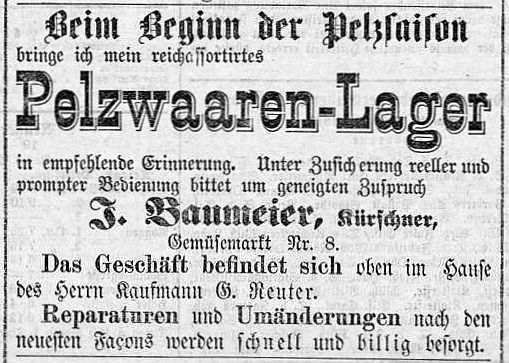 Pelzwaaren-Handlung Julius Baumeier, Düsseldorf, Gemüsemarkt Nr. 8 oben im Hause des Herrn Kaufmann G. Reuter. Anzeige 19.11.1873.